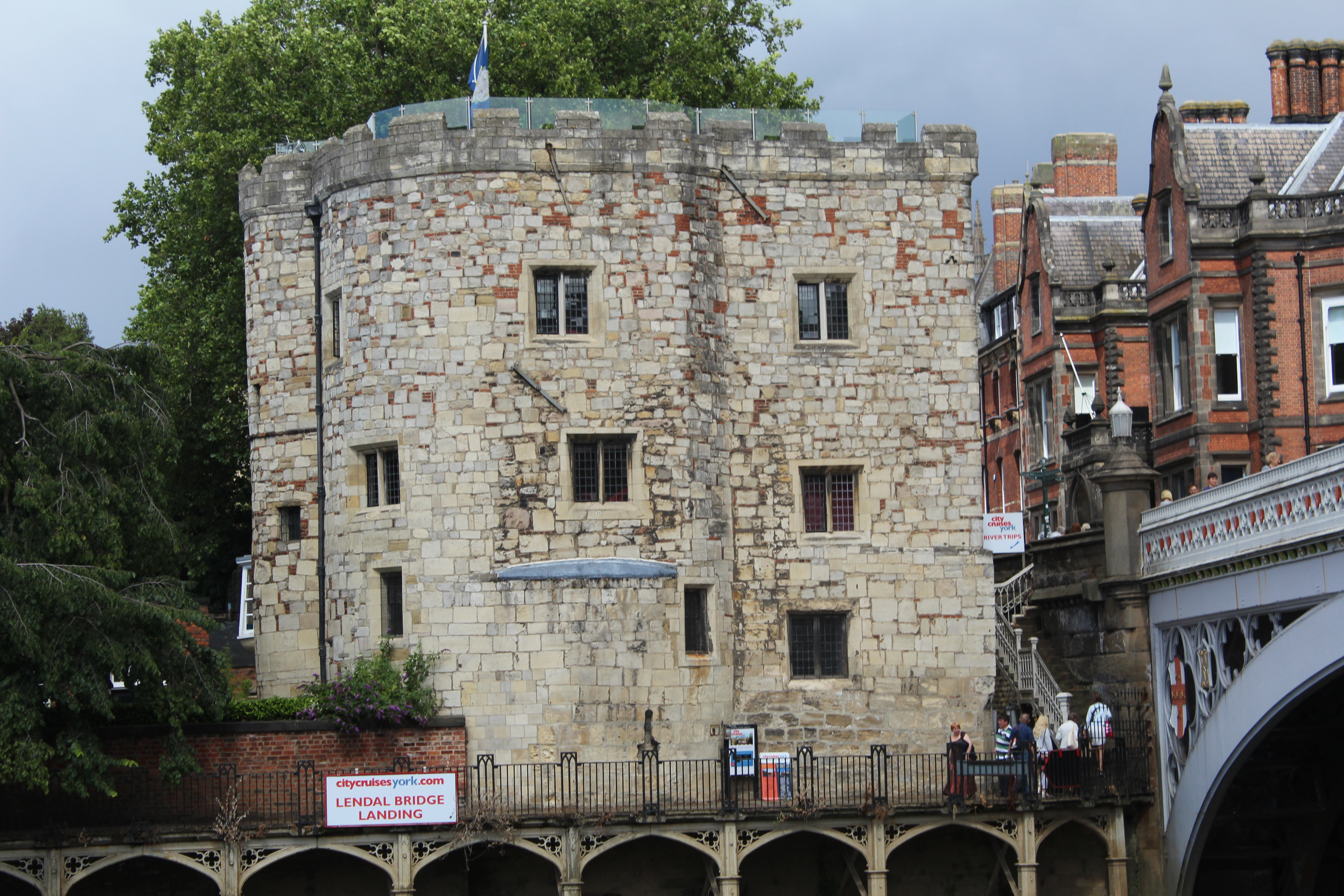 Tour 28, York.